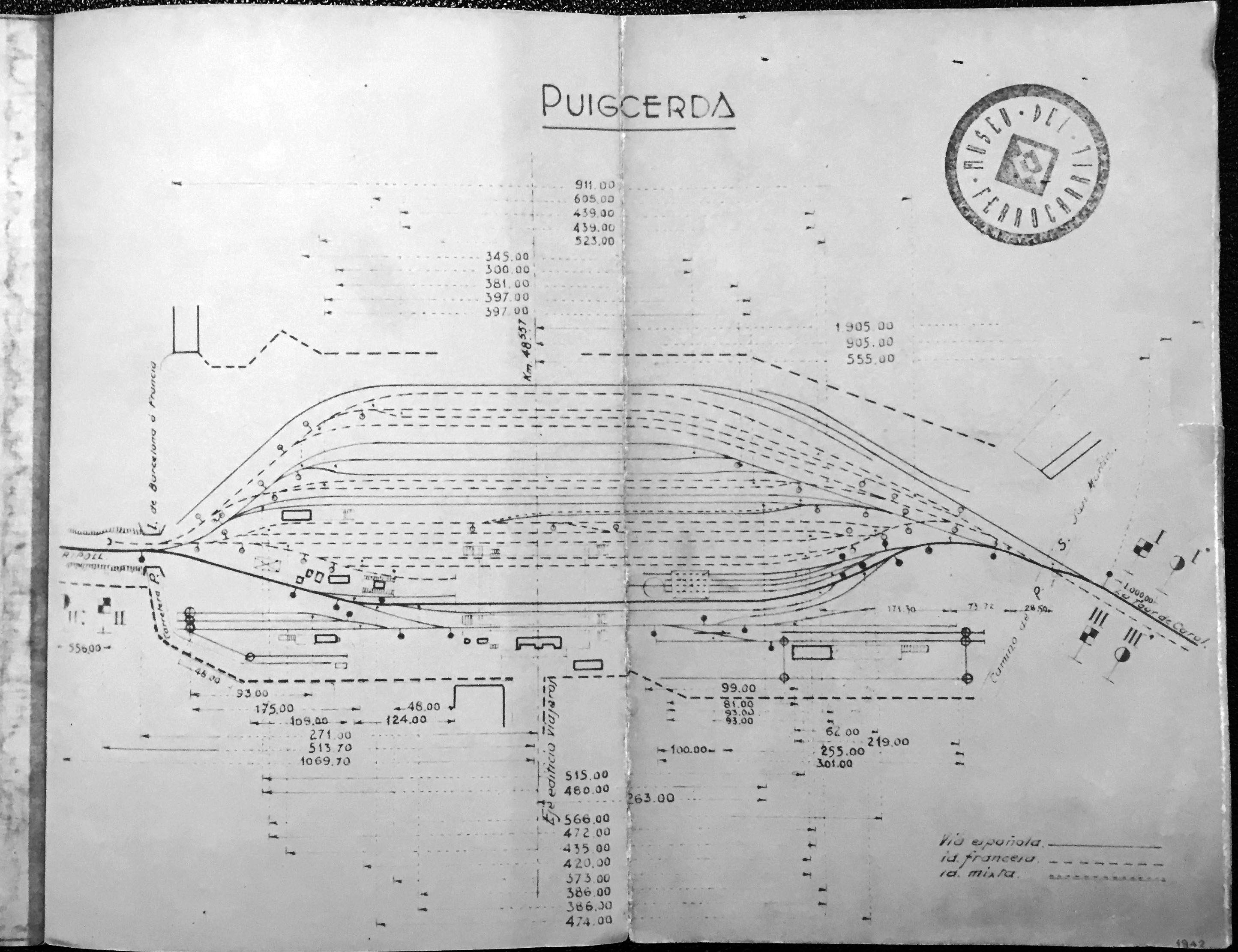 Plánol vies Estació Puigcerdà Any 1931